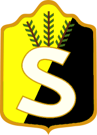 Mikkelin ja Kuopion suojeluskuntapiirien käsivarsikilpi.